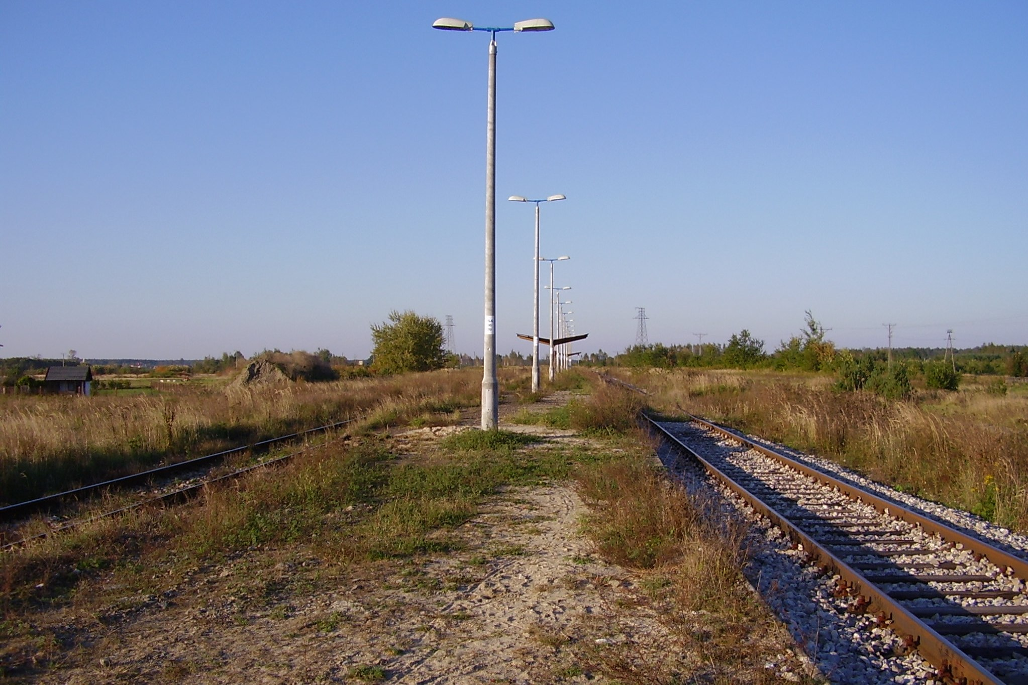 Stacja kolejowa Dęba Rozalin